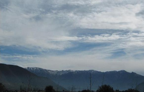 Cordillera de la Costa, Chile. Fotografìa tomada desde Lampa.